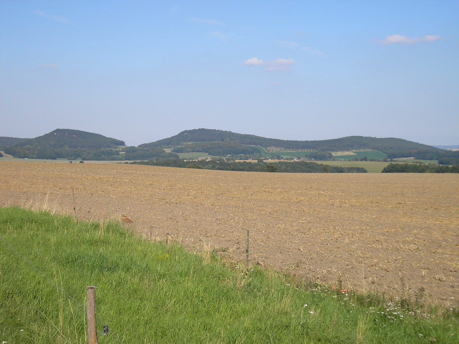 Blick auf die Reinsberge bei Ilmenau (Thüringen, Deutschland).